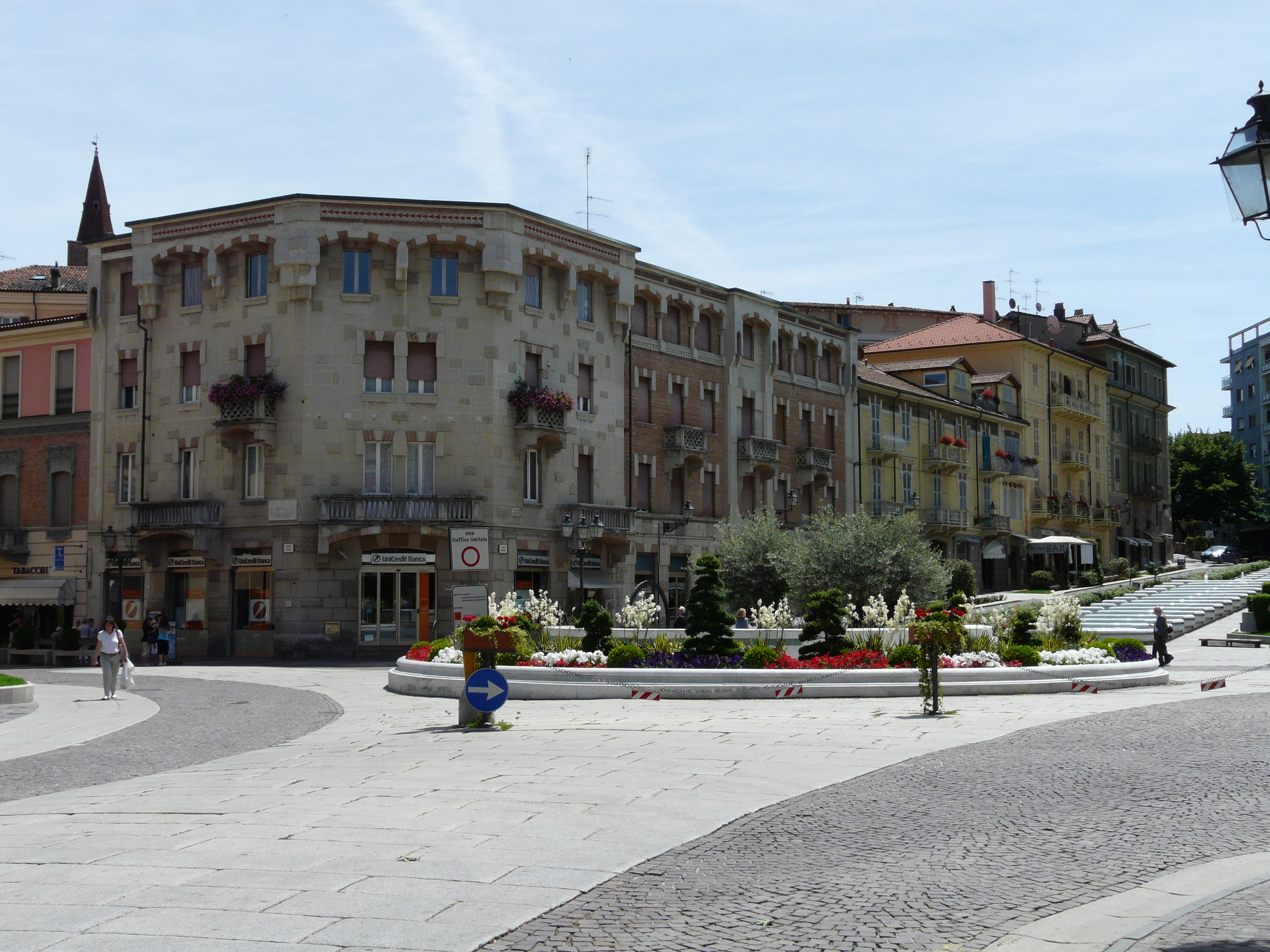 Scorcio di piazza Italia, Acqui Terme, Piemonte, Italia